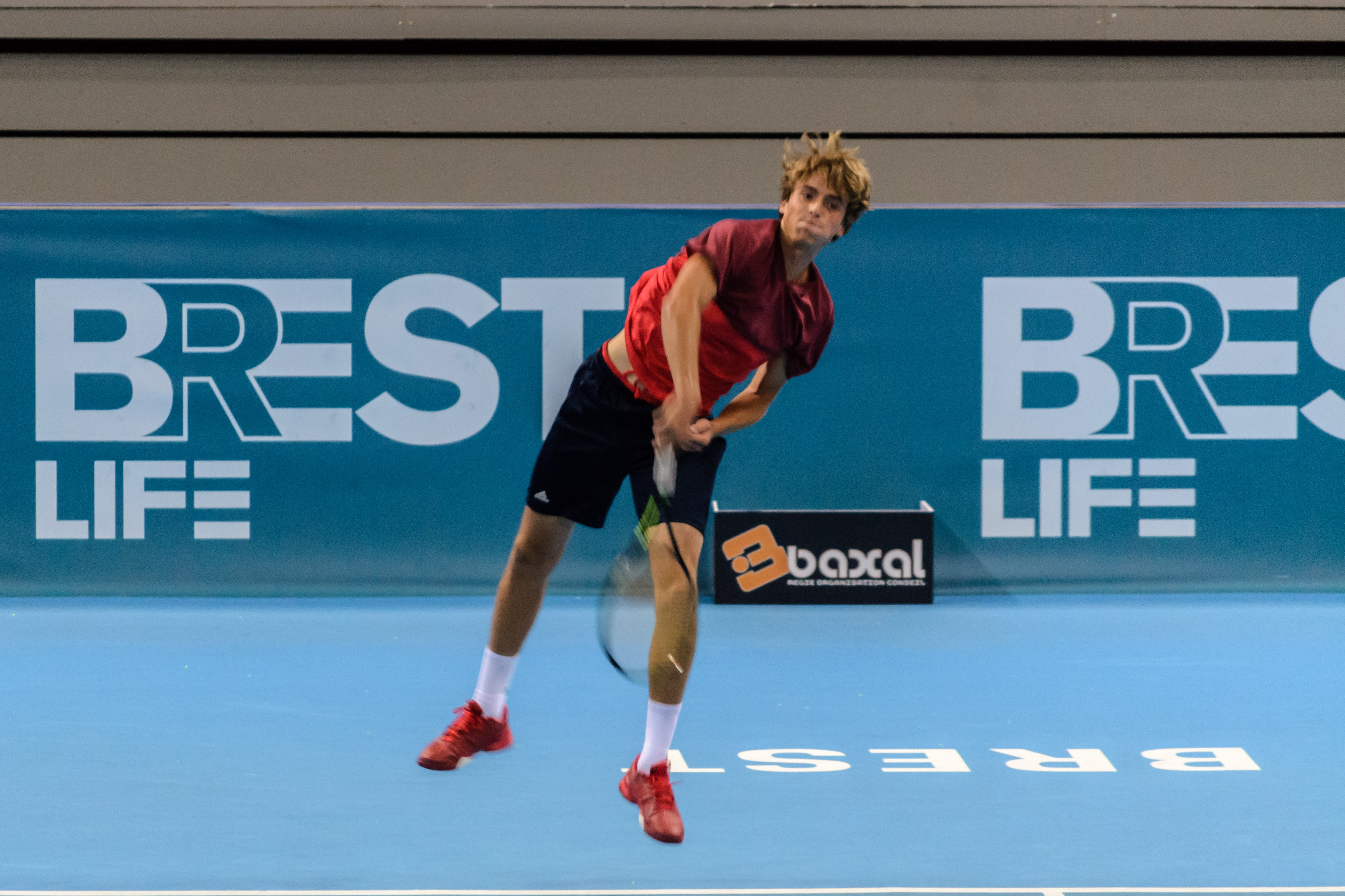 Rencontre entre Jérémy Chardy et Stefanos Tsitsipas lors de l'Open Brest Arena le 19 octobre 2016. Jérémy Chardy s’est imposé face au jeune Grec, n°1 mondial chez les juniors, en deux sets, 6/2 – 6/3.